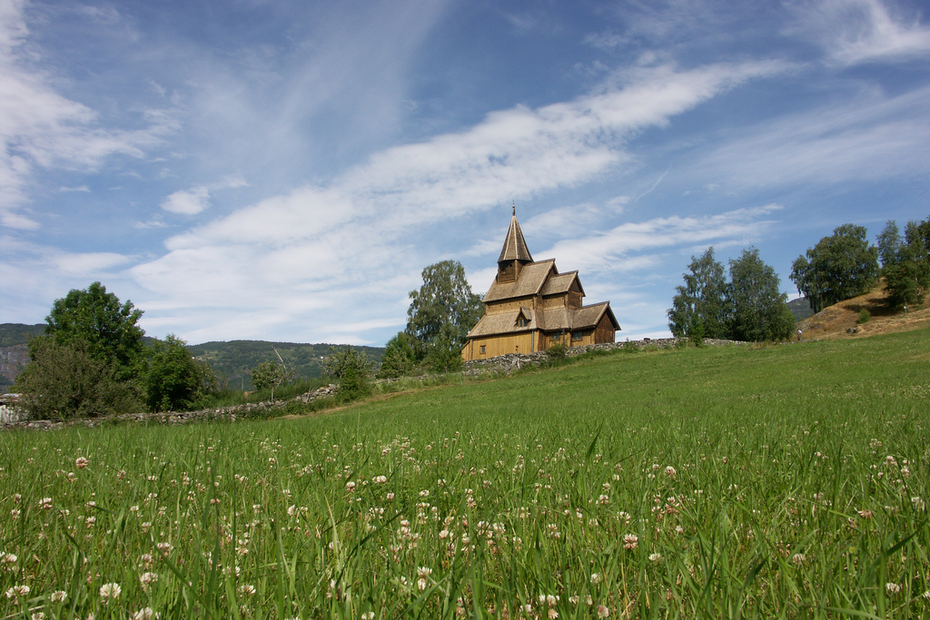 Urnes stavkyrkje sett frå sør